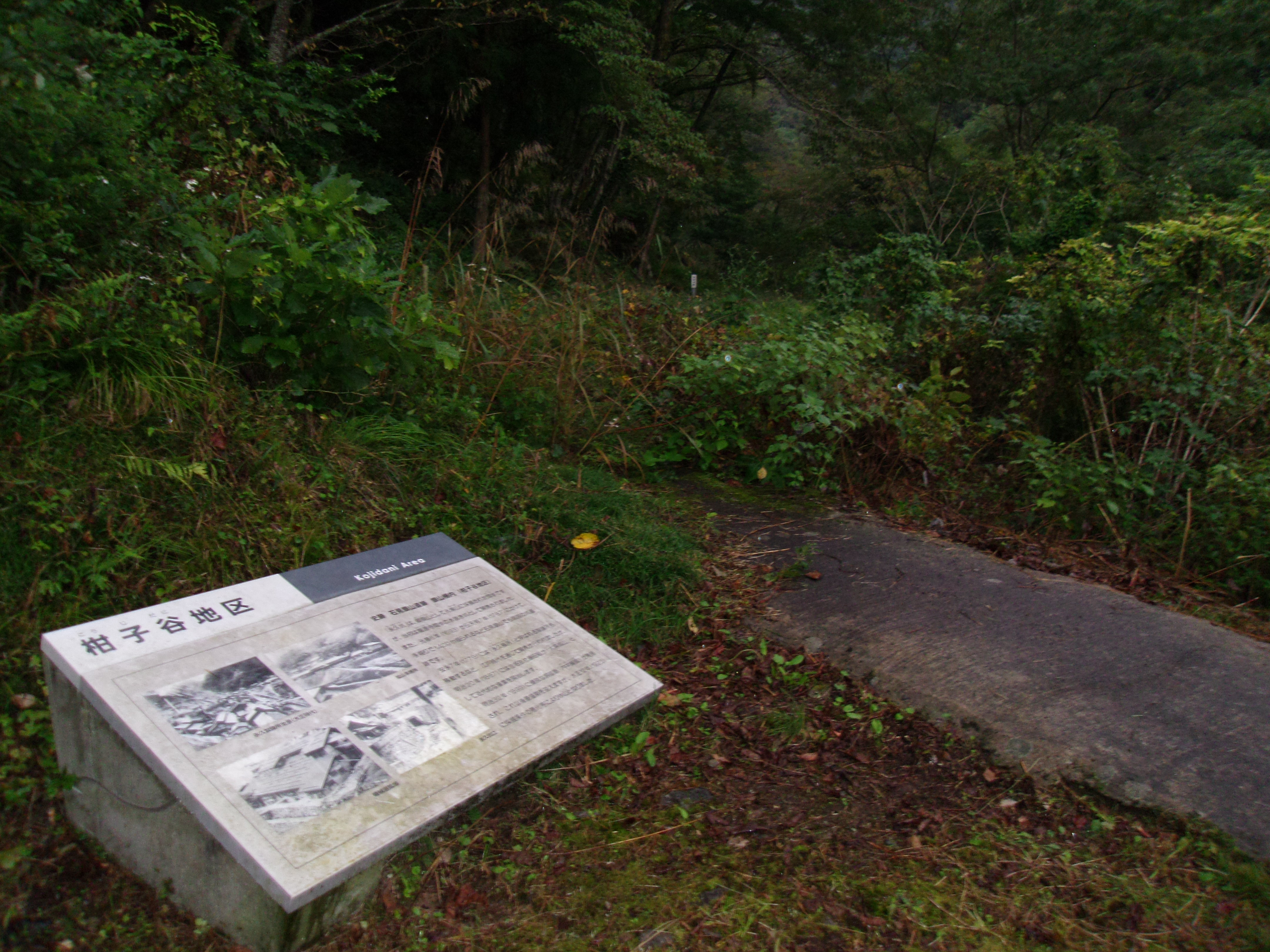 世界遺産「石見銀山」の構成資産である銀山街道鞆ヶ浦道 柑子谷地区